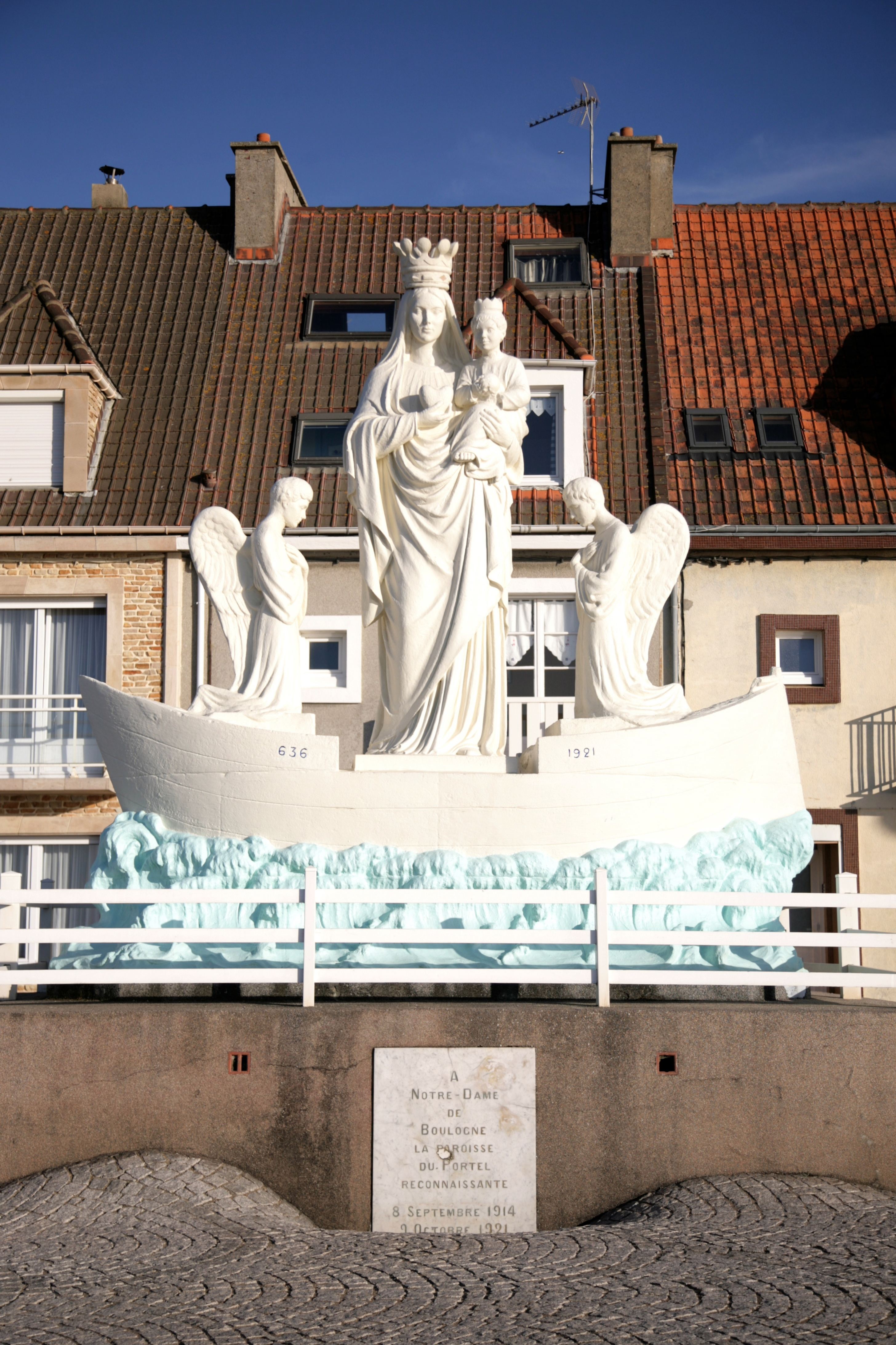 France, Pas-de-Calais, Le Portel : " Vierge à l'enfant "